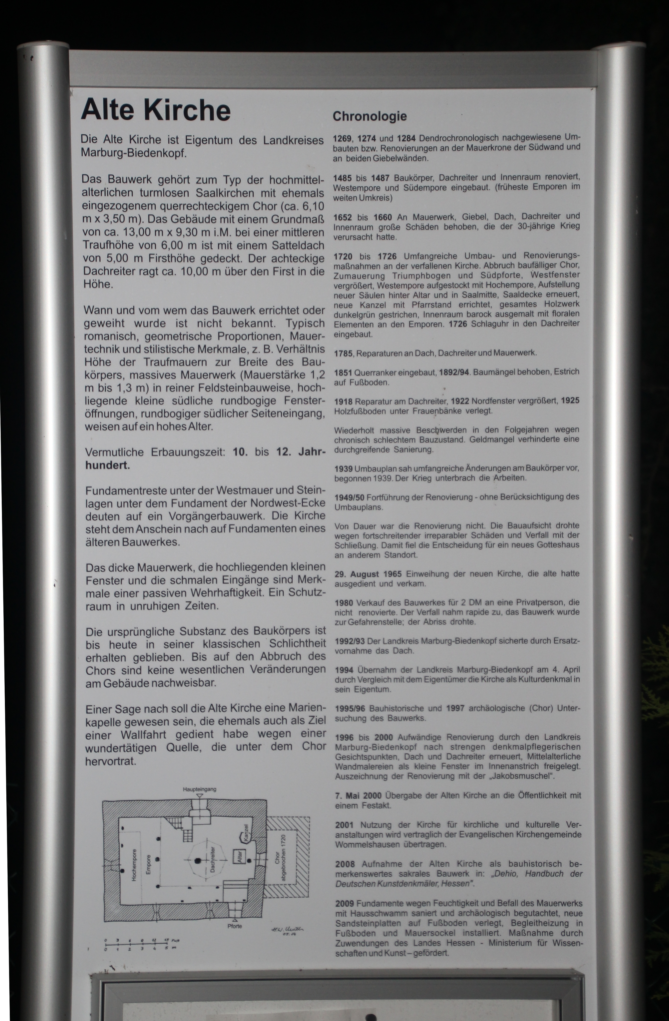 Hinweisschild an der alten Kirche in Wommelshausen. Vermutlich 2014/15 aufgestellt